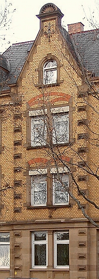 Ausschnitt aus unten genannter Quelle